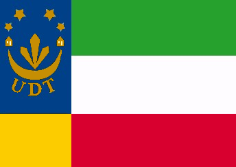 Flag of East Timorese party União Democrática Timorense UDT